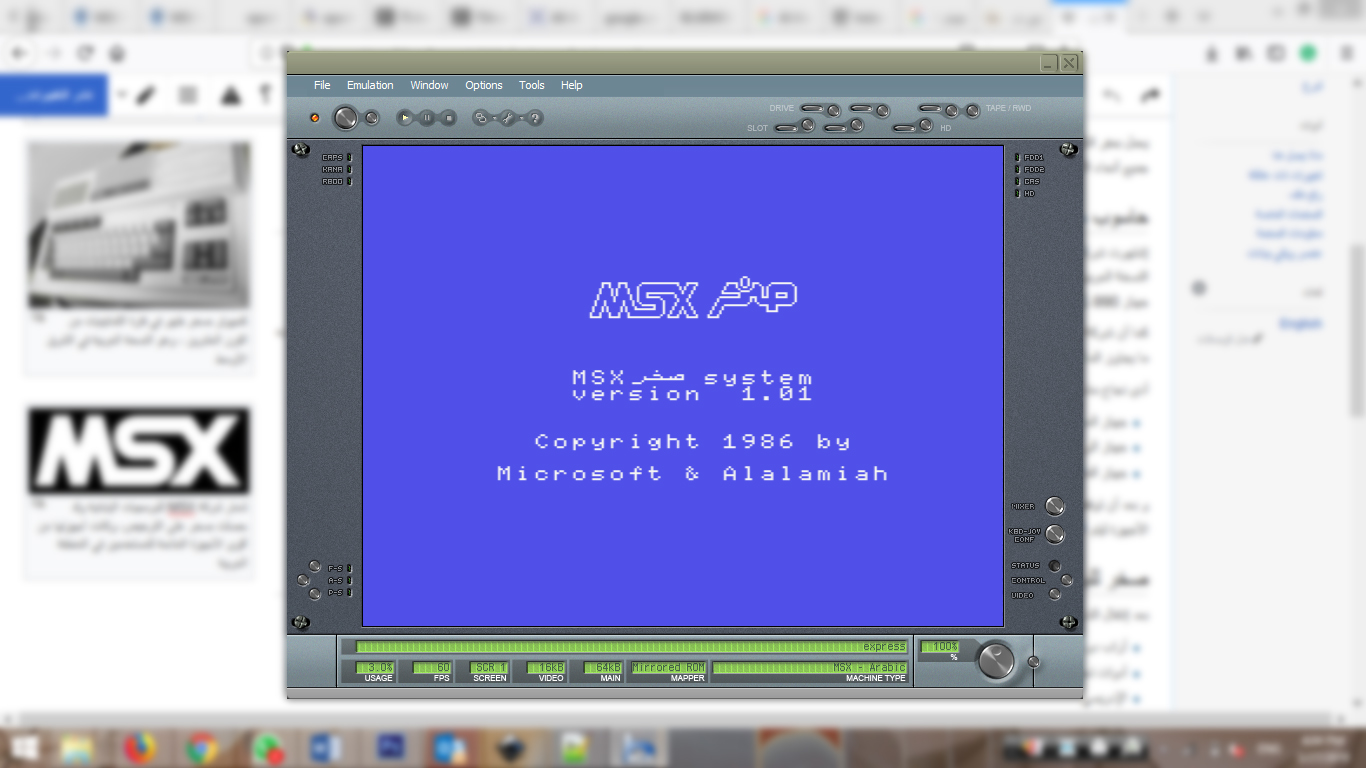 شاشة البدء في الإصدار 1.01 من نظام التشغيل صخر MSX